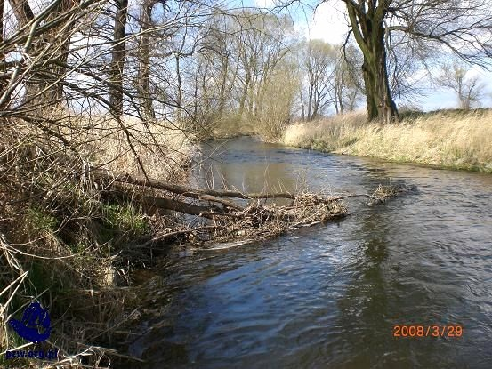 Nysa Szalona pomiędzy Słupem a Krajowem